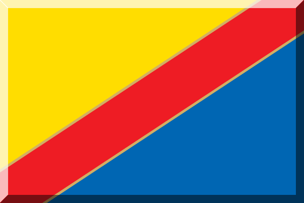 Giallo Rosso bordato Oro e Blu (Diagonale)